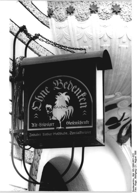 Leipzig, Wirtshausschild ADN-ZB Kluge 21.8.86 Leipzig: Gosenschenke-"Ohne Bedenken" kann man in der Leipziger Menckestraße wieder Gose trinken. Originell wie das Wirtshausschild ist auch die Innenausstattung der Spezialgaststätte. Der Gastronom Lothar Goldhahn richtete unter dem ursprünglichen Namen die Schenke wieder so her, wie sie zu Beginn unseres Jahrhunderts im Biedermeierstil entstanden war. (siehe 23, 24 25 N und ADN-Meldung am 22.8.86)